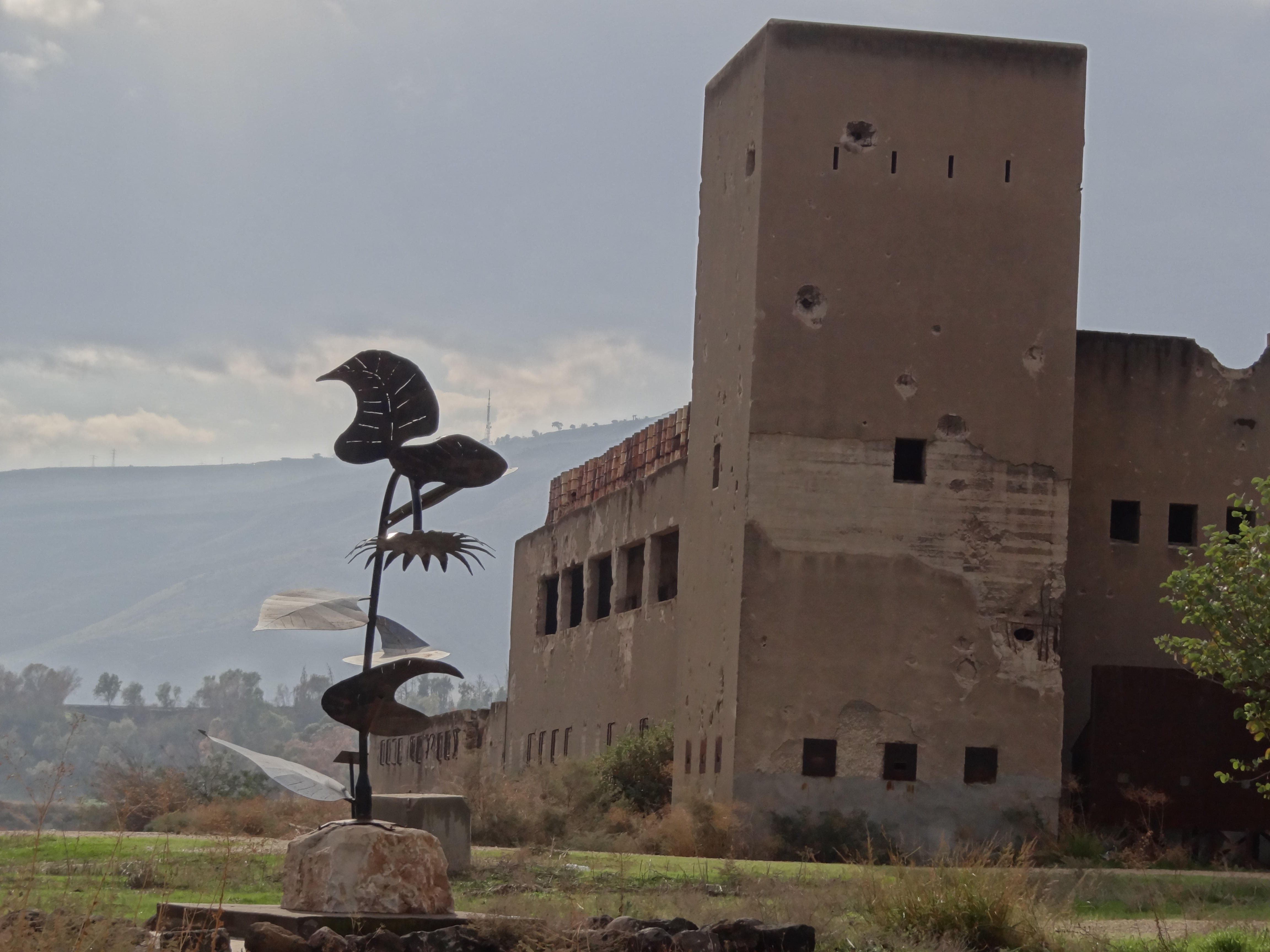 Old British police station from 1948 near kibbutz Gesher המבנה ההיסטורי של משטרת גשר ששוכן ליד חצר גשר הישנה